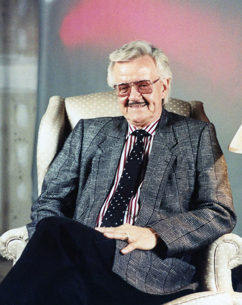 Cantor gospel